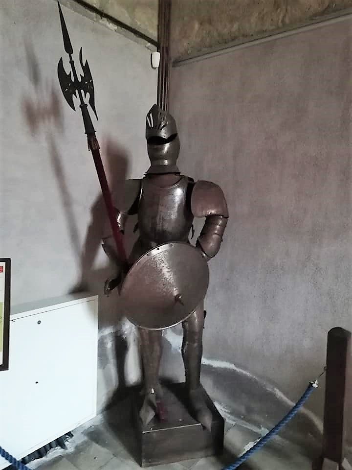 Armatura metallica, ricostruzione storica.